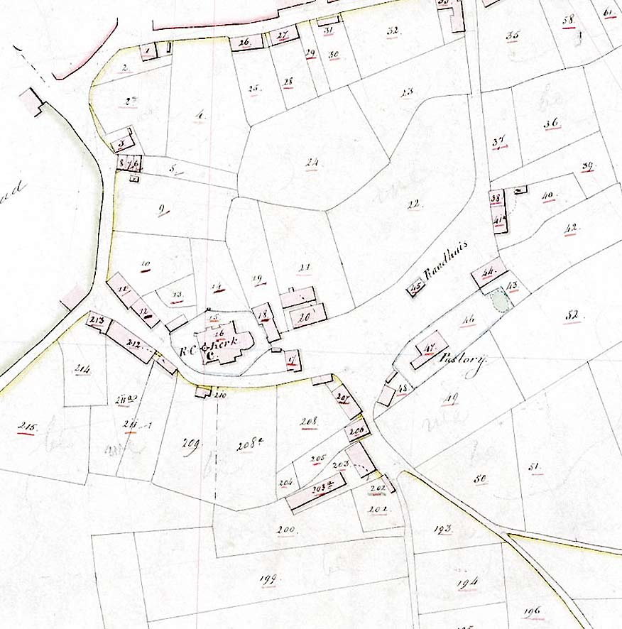 Kadastrale kaart van een deel van Tongelre (thans gemeente Eindhoven), Nederland